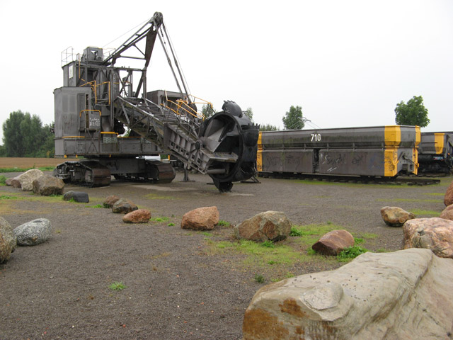 Historischer Exkavator beim Tagebau Schöningen im Helmstedter Revier. 12 km from Helmstedt, Deutschland (Zone 32).